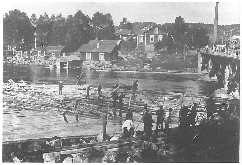 Tukinuittoa Vaajakoskessa 1900-luvun alussa